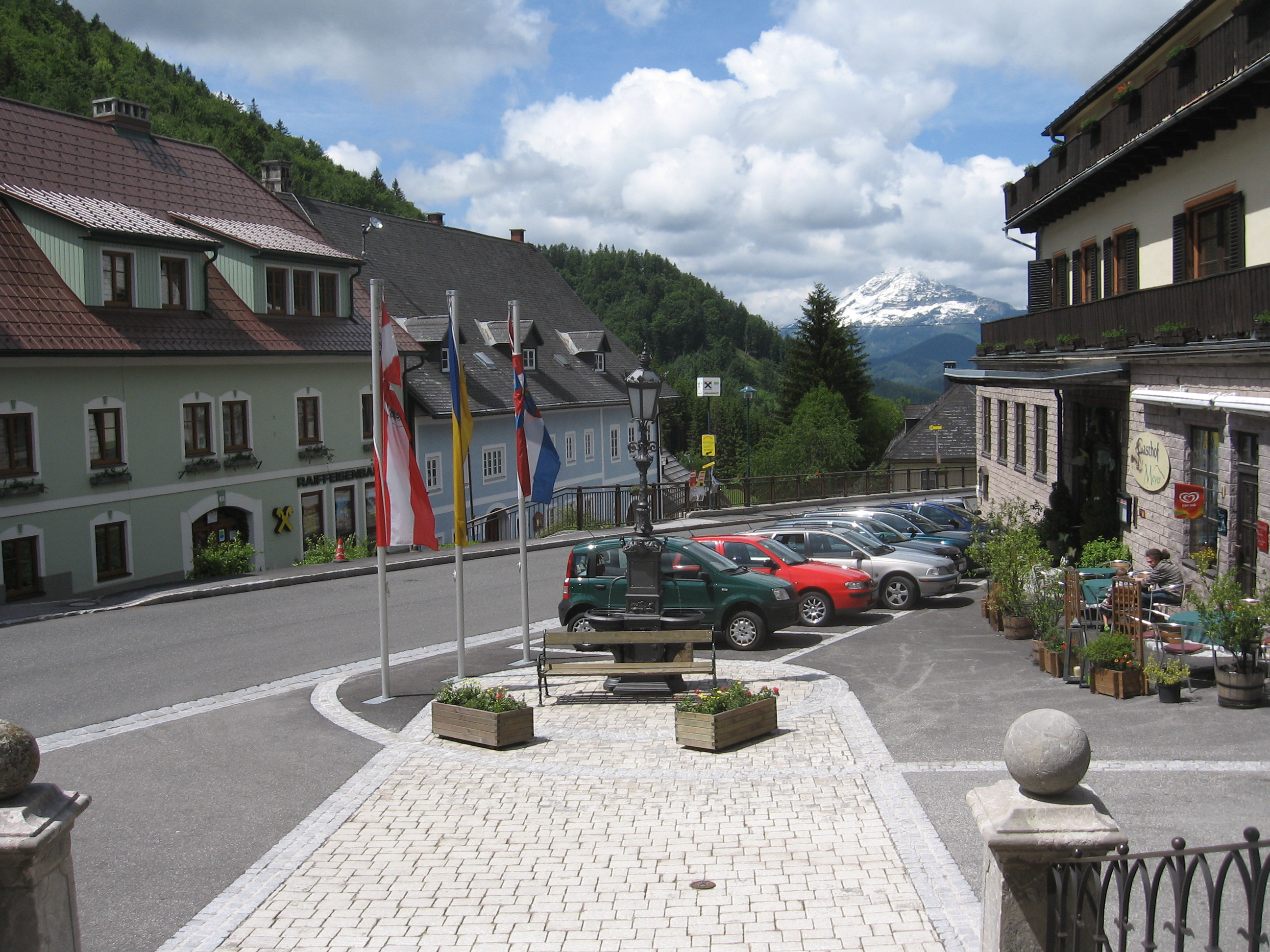 Annaberg (Niederösterreich) - Ortskern